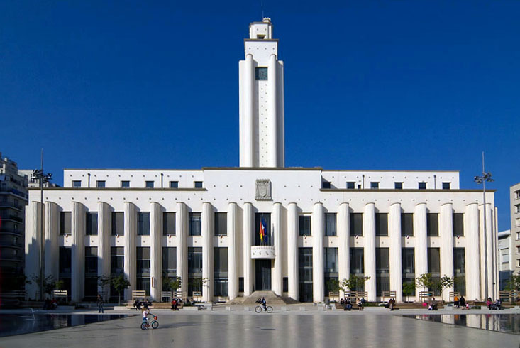 Place Lazare Goujon à Villeurbanne : L'hotel de Ville